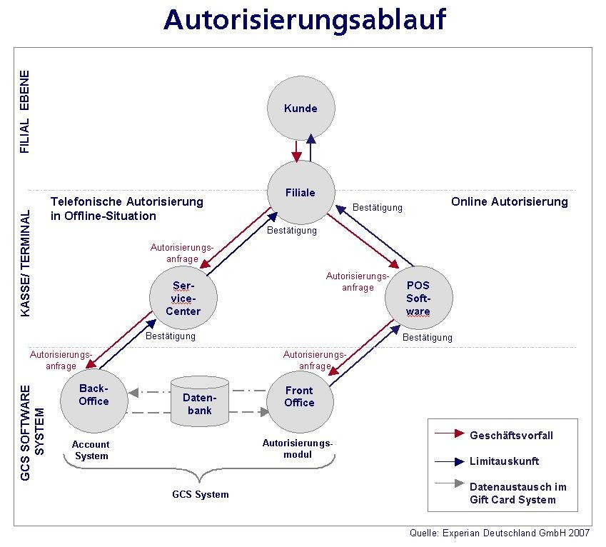 Autorisierungsablauf